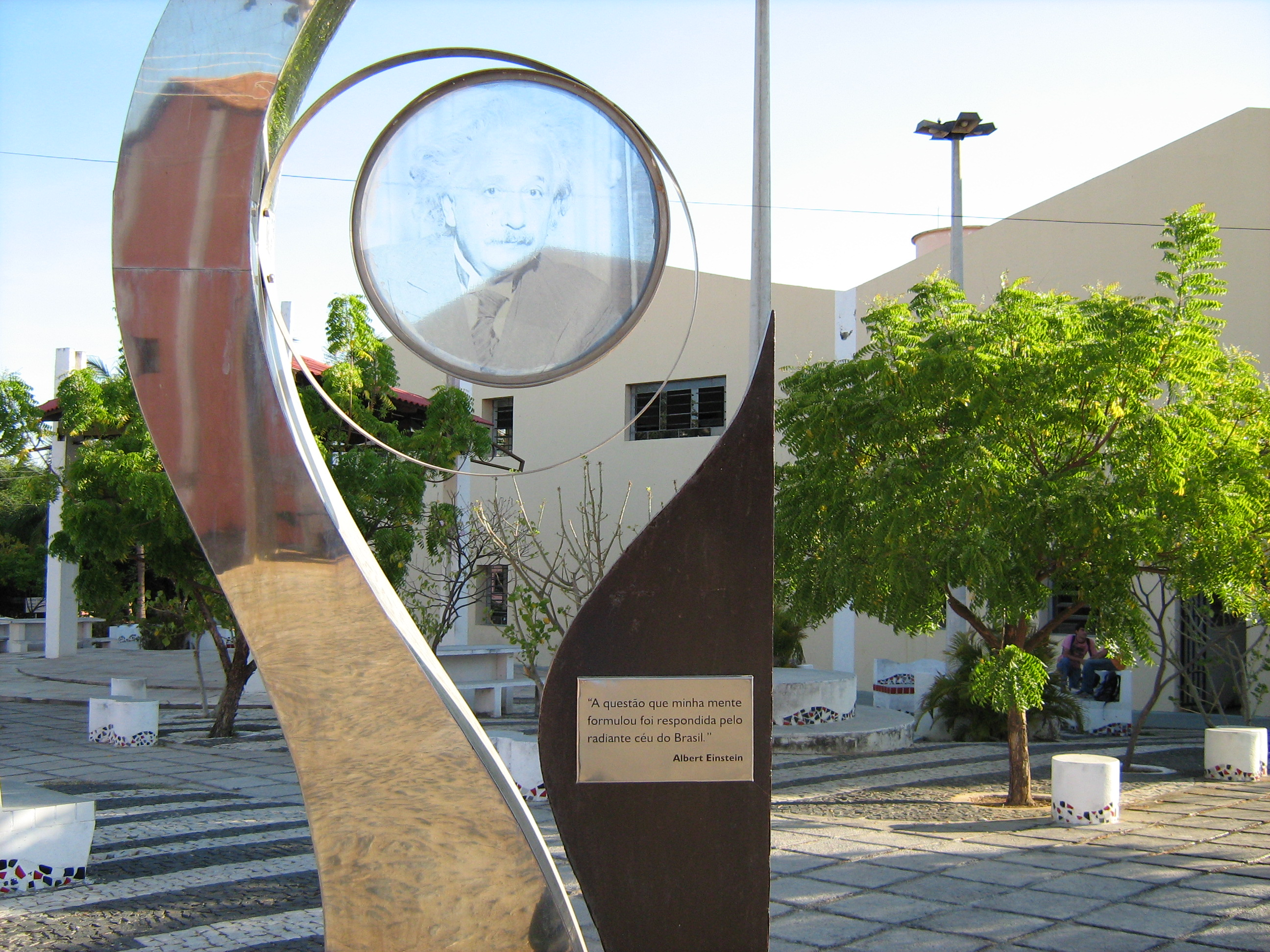 Monumento em Homenagem a Albert Einstein na Universidade Estadual Vale do Acaraú - Campus Cidao